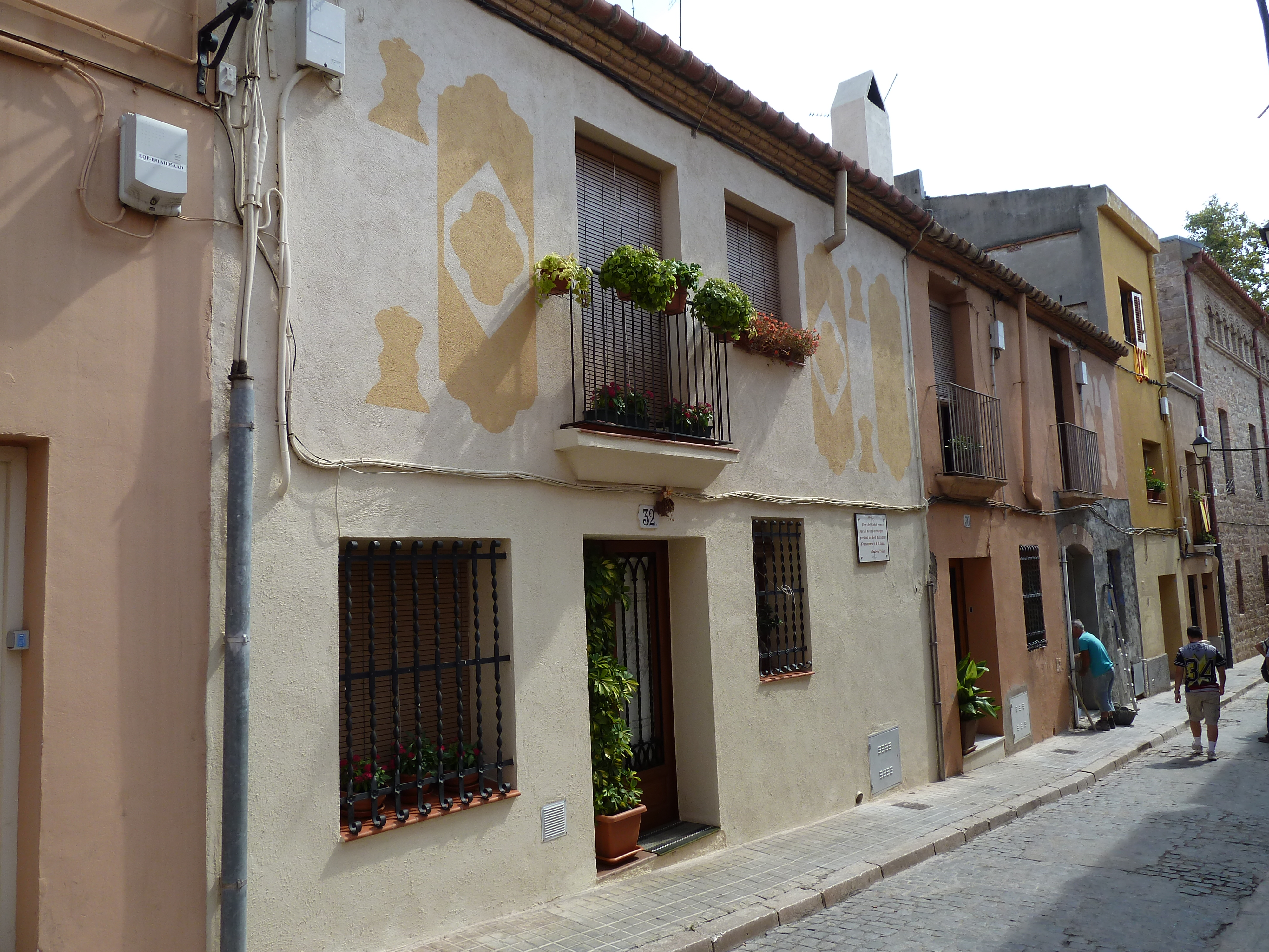 L'Hospitalet de Llobregat